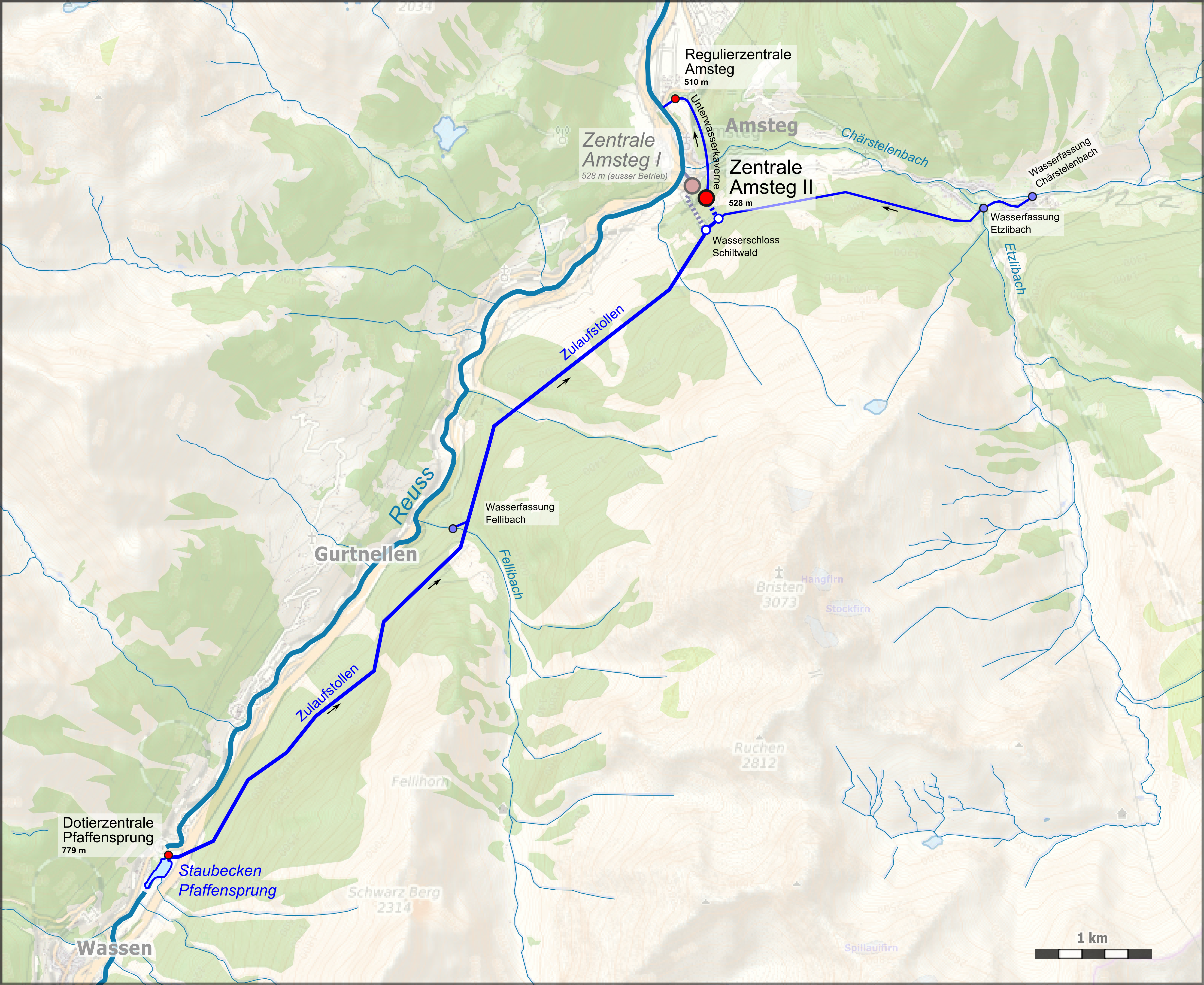 Lagekarte des Kraftwerks Amsteg